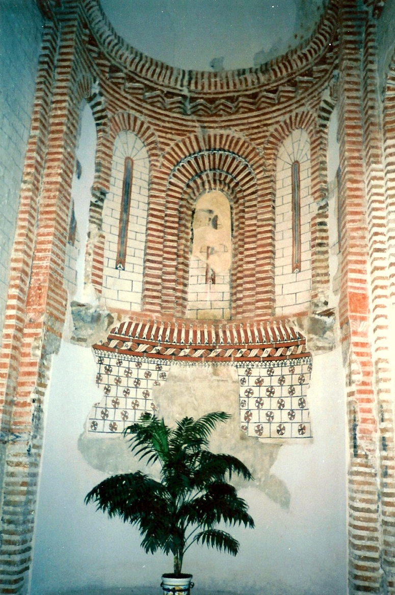 Frescos murales de estilo mudéjar en la iglesia de San Andrés de Cuéllar